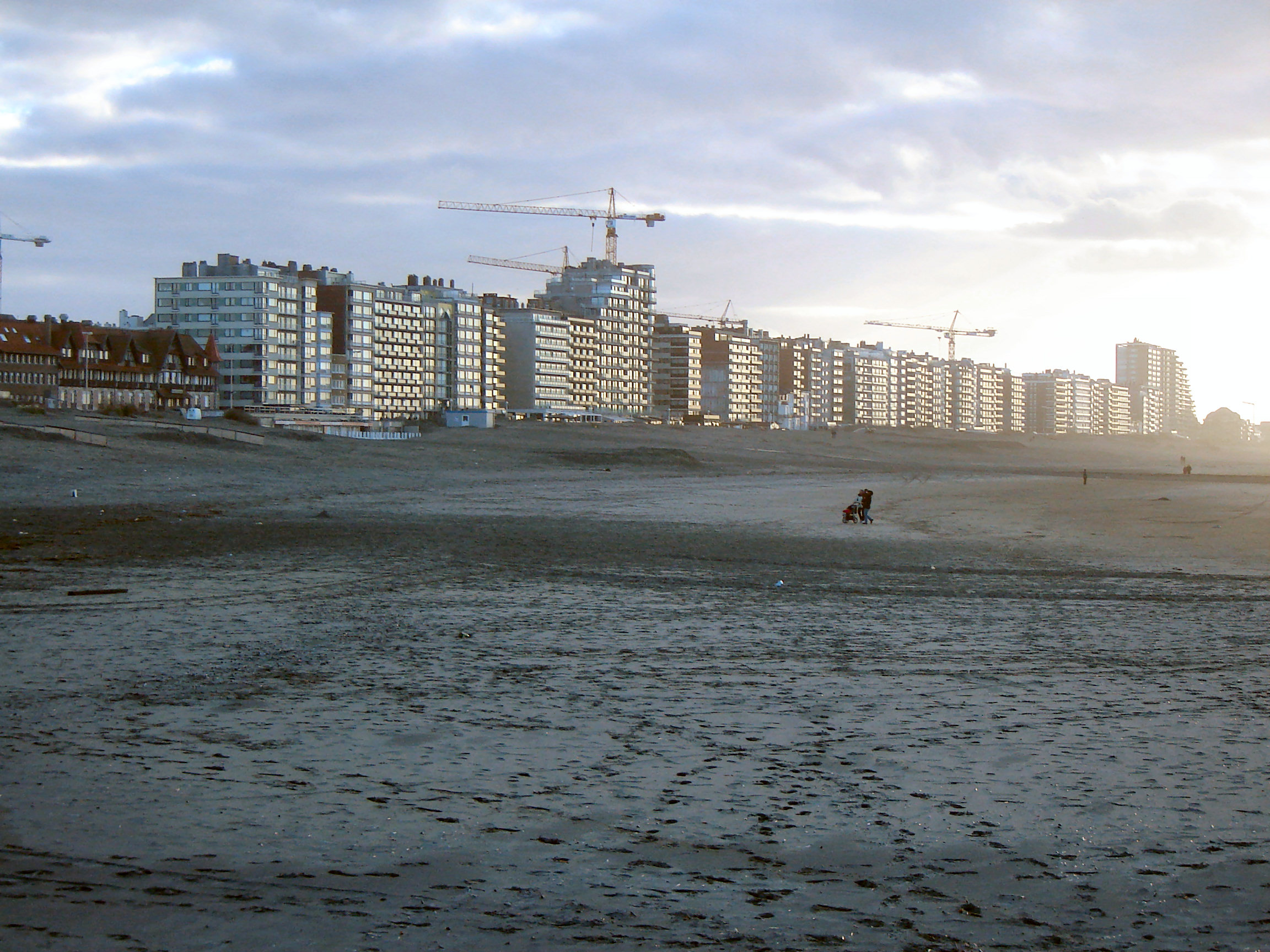 Skyline of Nieuwpoort-Bad, Nieuwpoort, West Flanders, Belgium